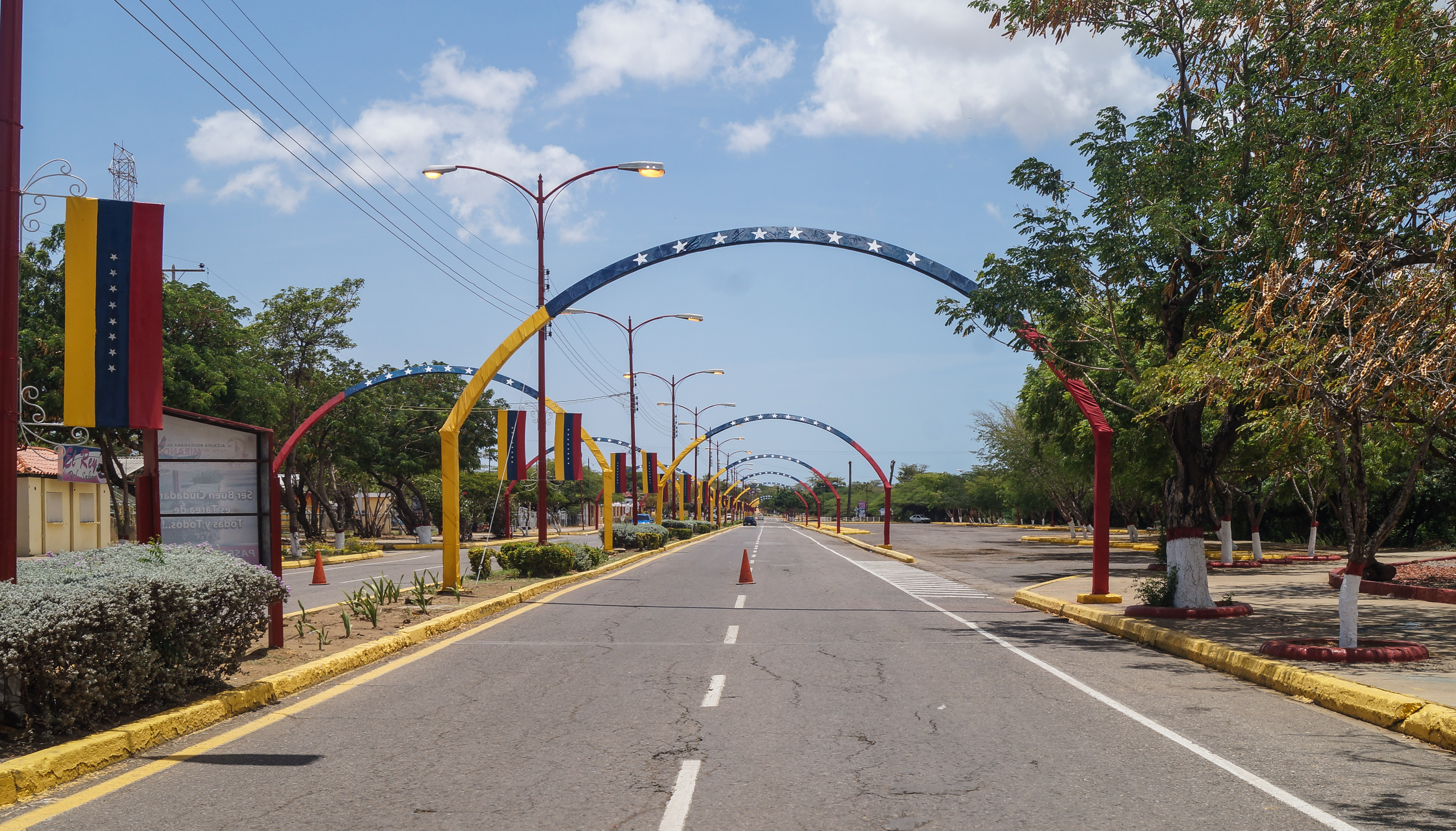 Entrada área recreativa Médanos de Coro. Estado Falcón. Venezuela.